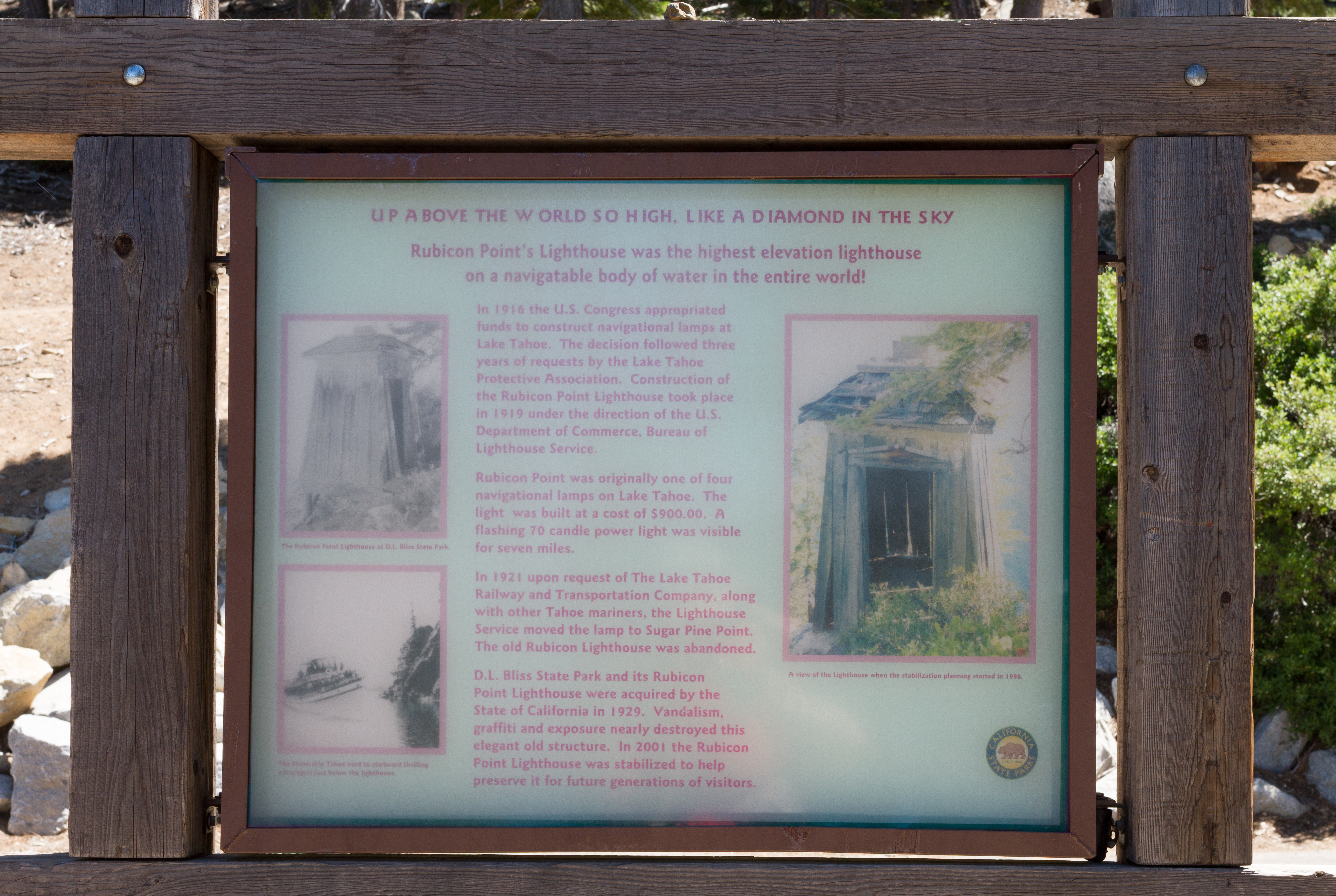 Signage at D.L. Bliss State Park with information about Rubicon Point Lighthouse.